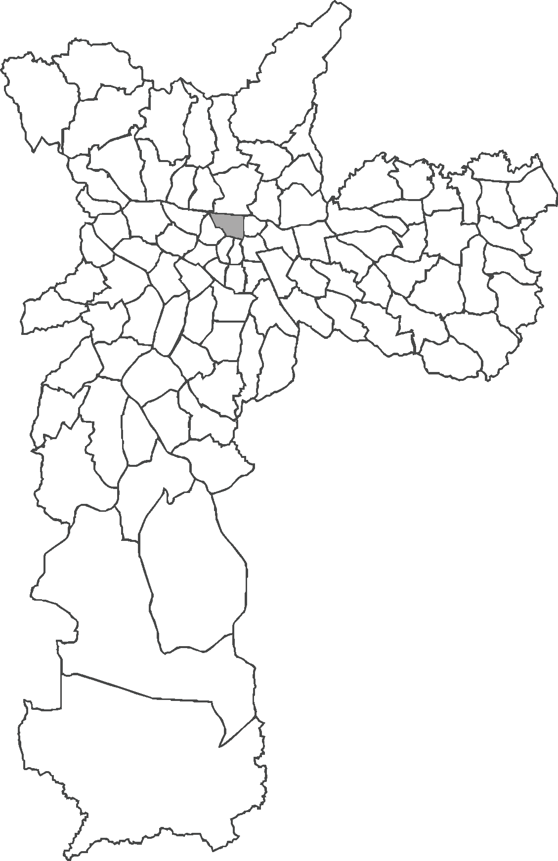 Localização do distrito do Bom Retiro no município de São Paulo.